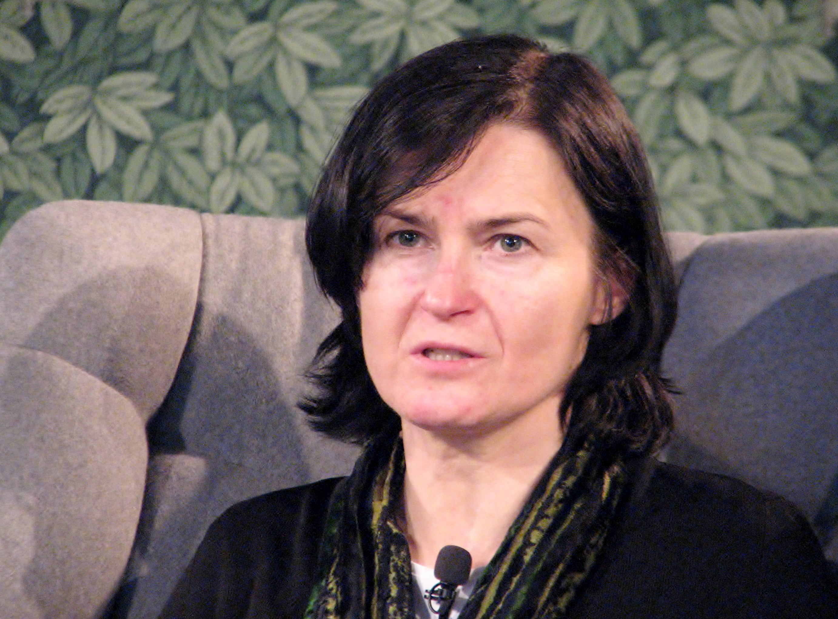 Undinė Radzevičiūtė esinemas kirjandusfestivali HeadRead raames Tallinna kirjanike maja musta laega saalis